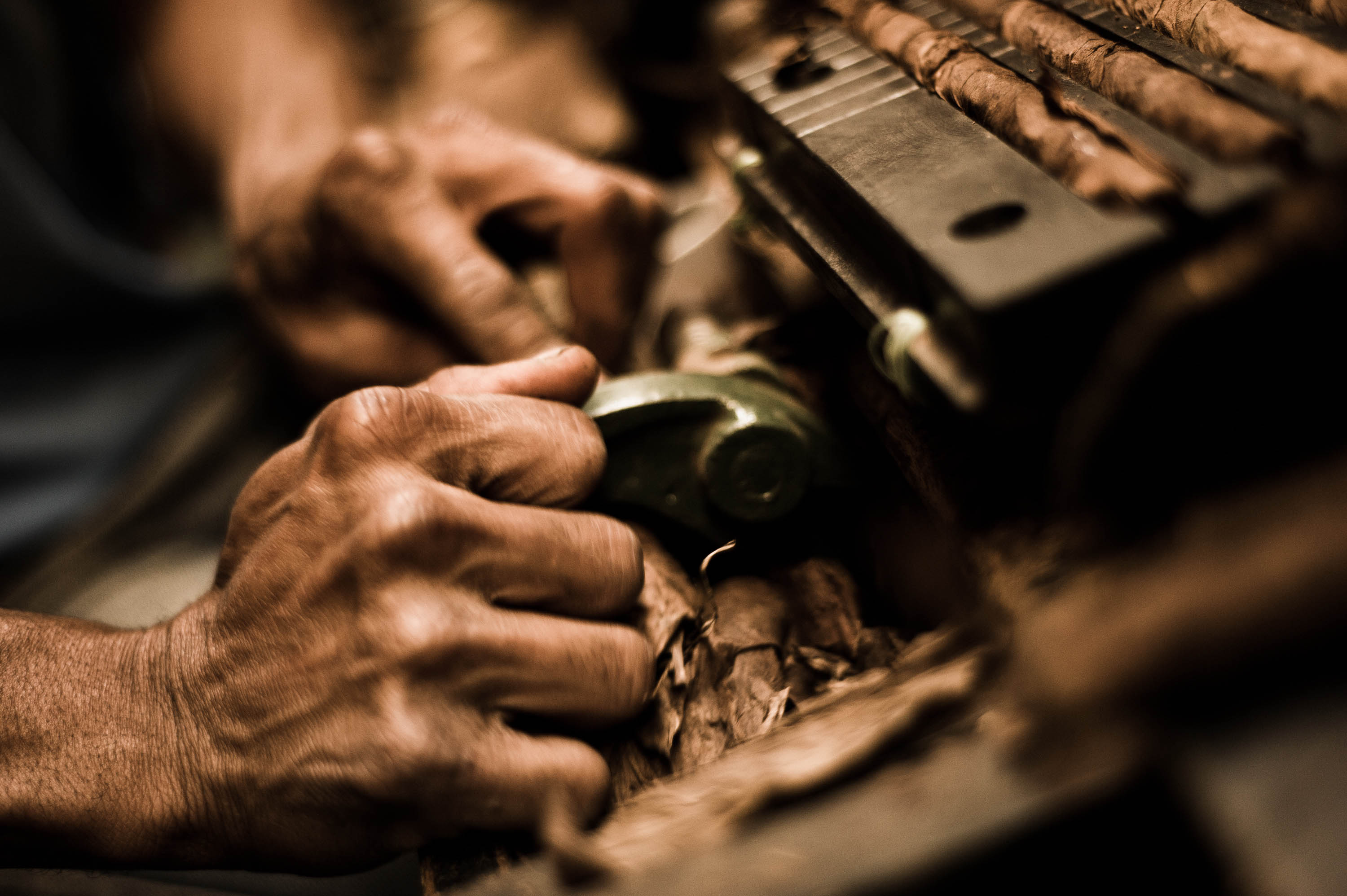 Handmade cigar production, process. Tabacalera de Garcia Factory. Casa de Campo, La Romana, Dominican Republic. Keywords:Caribbean; Casa Del Campo; Cigar factory; Dominican Republic; La Romana